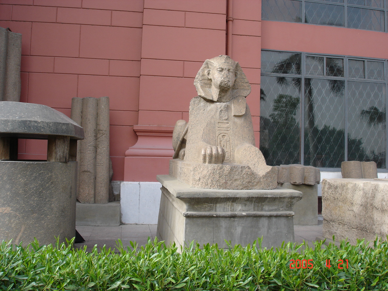 II. Ramszesz szfinxe a múzeum kertben (Egyiptom, Kairó, Tahrír tér, Múzeum kert)